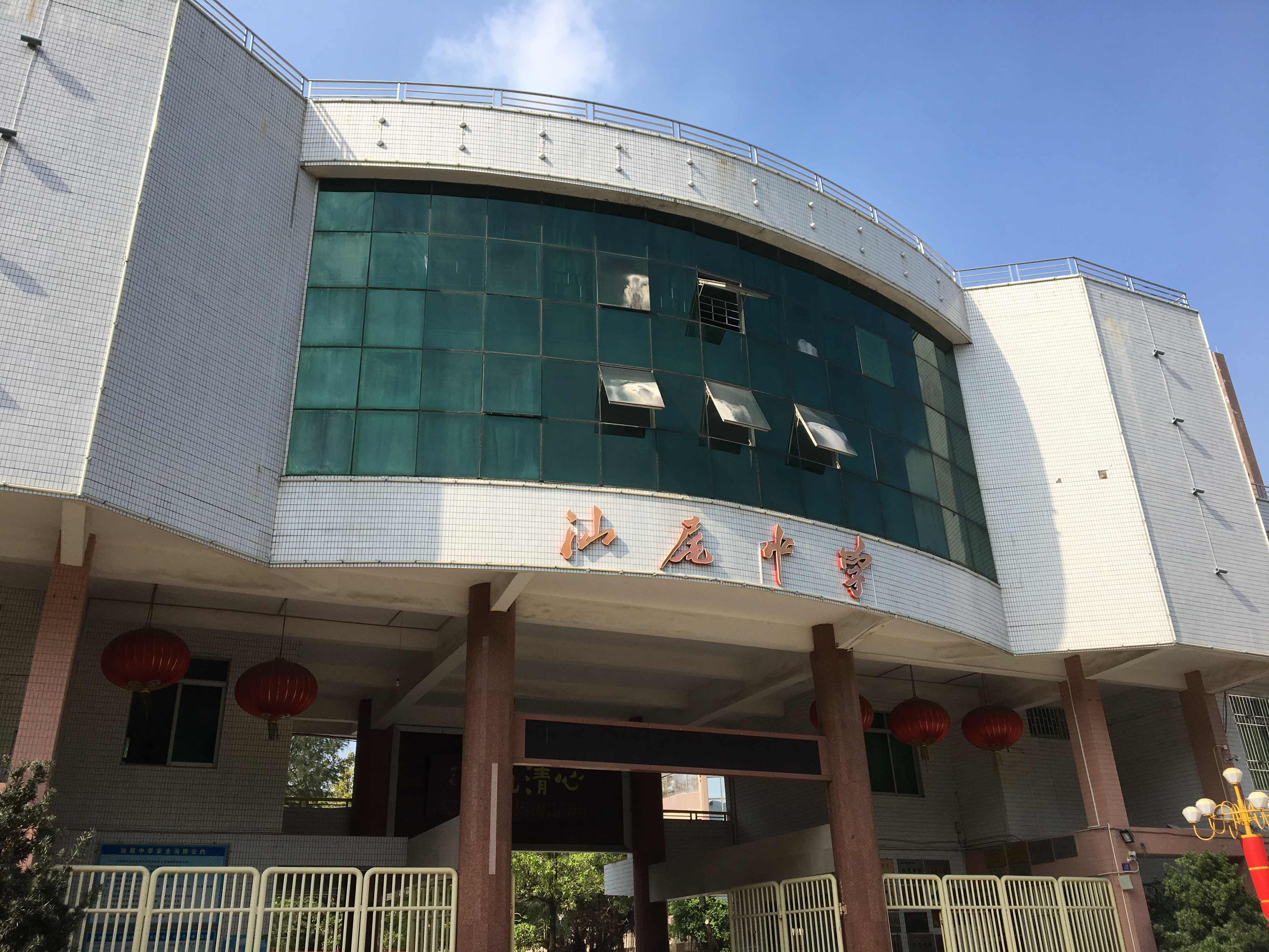 汕尾市的汕尾中學